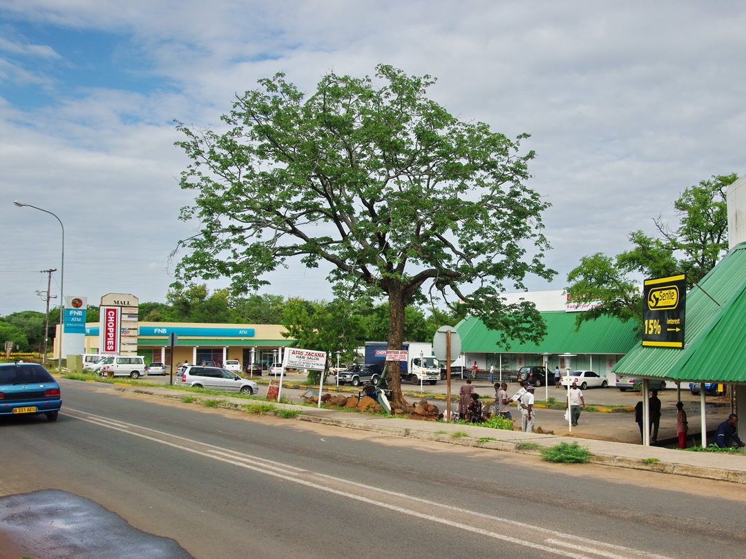 an der Hauptstraße von Kasane